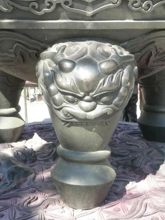 香炉腿上的狻猊 拍摄 Category:中国神话动物